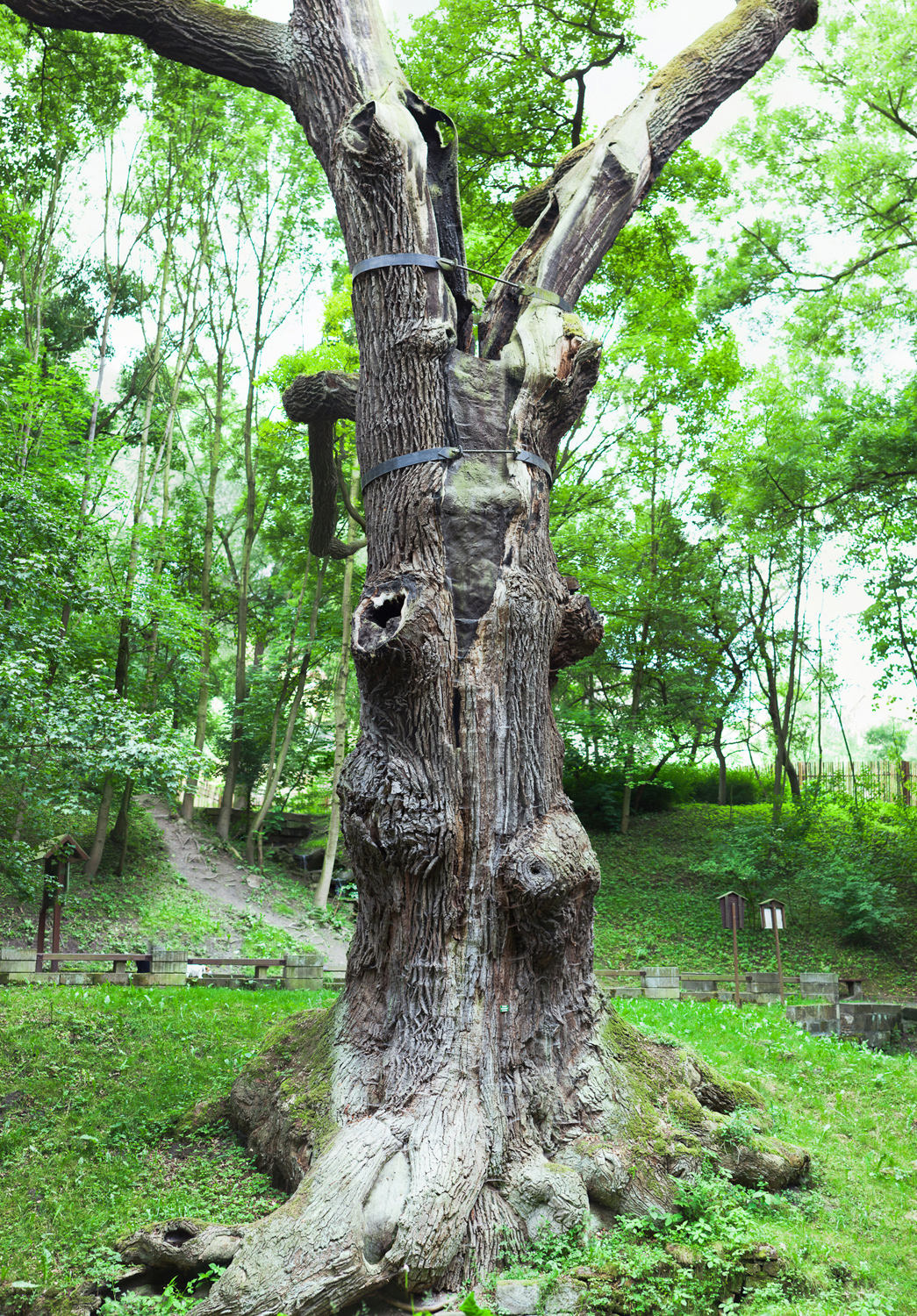 Oldřichův dub na Peruci